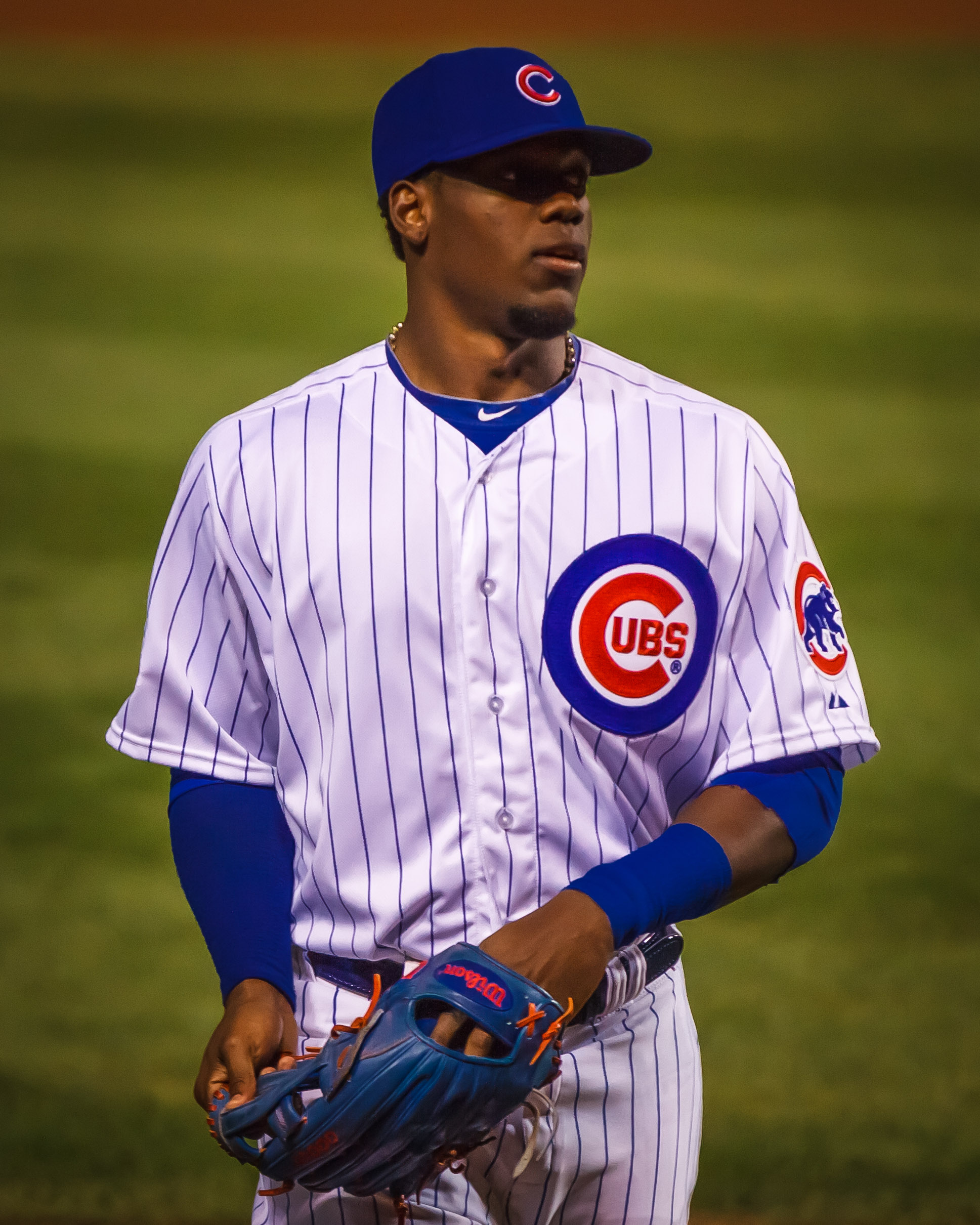 Jorge Soler 2014